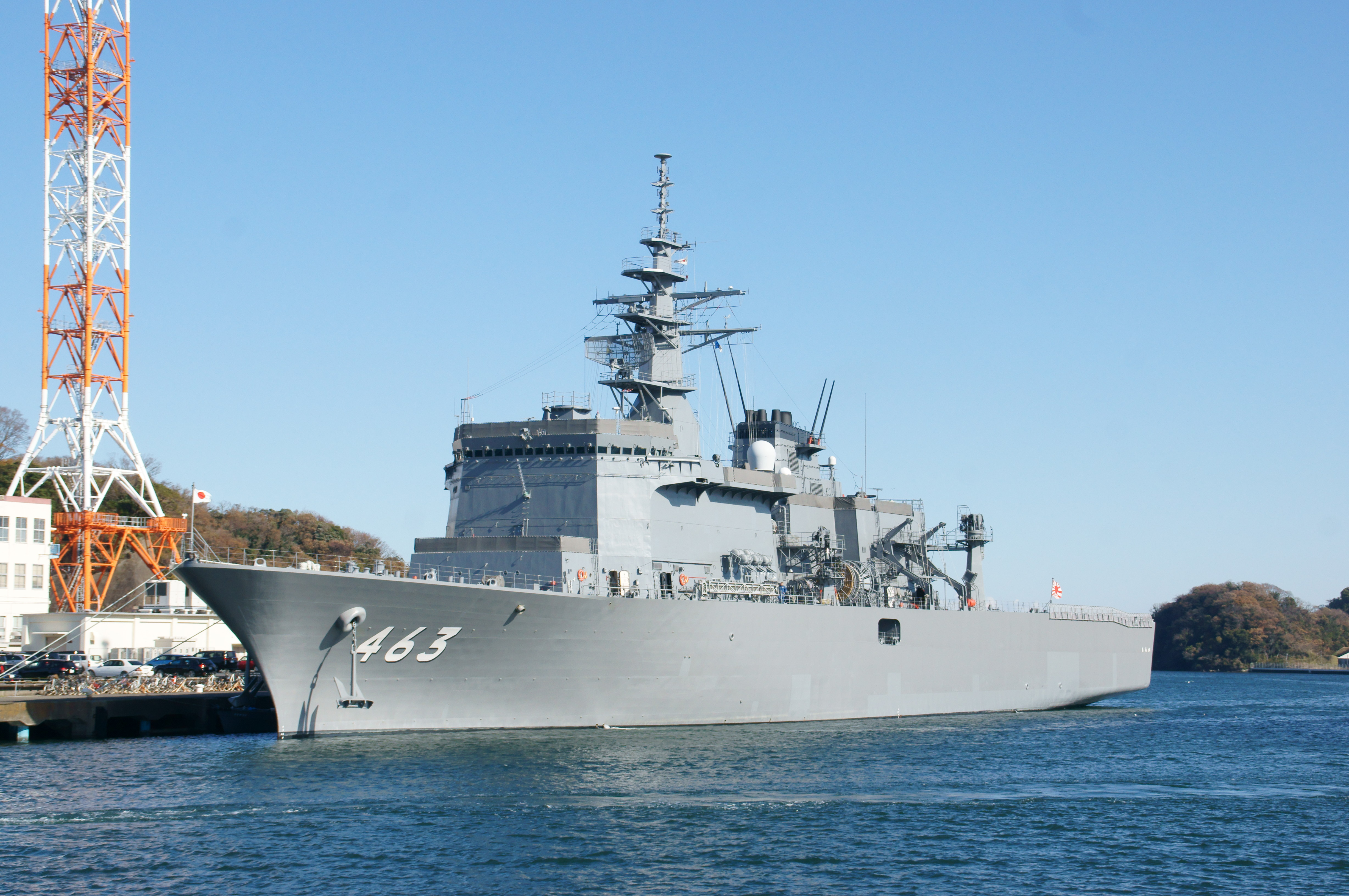 うらが、横須賀港にて